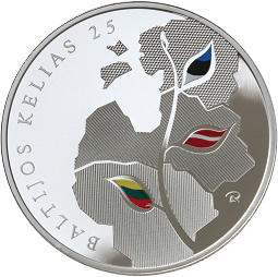 50 litas coin